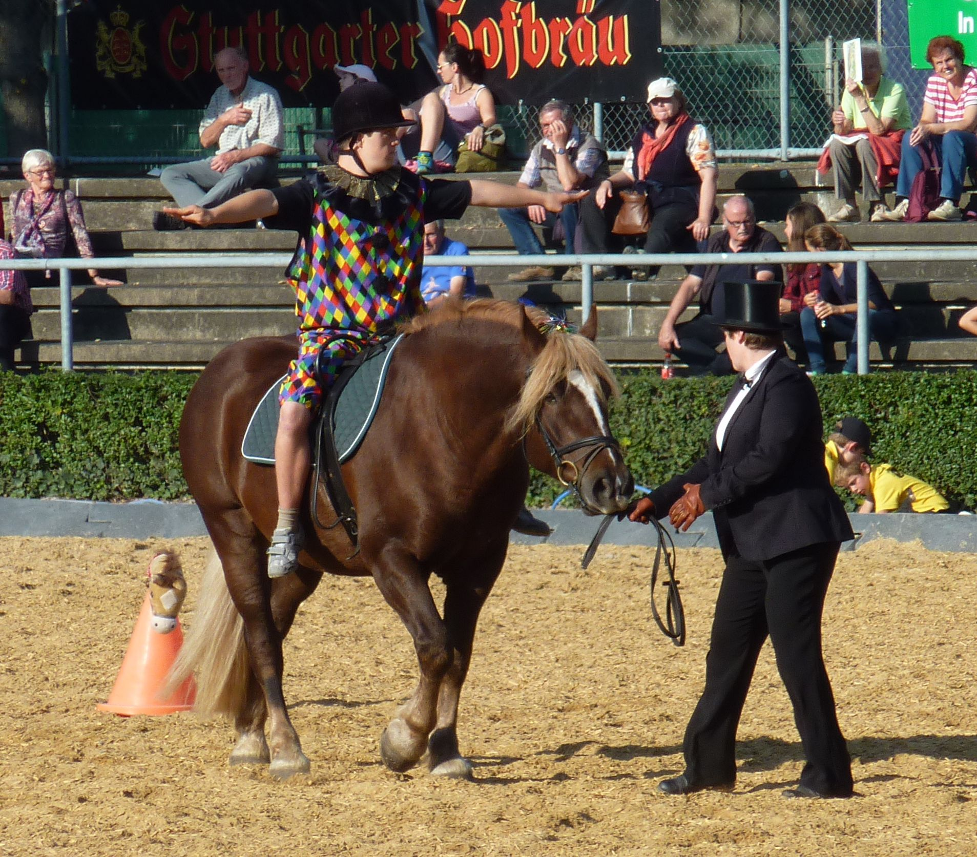 Vorführungen auf dem Landwirtschaftlichen Hauptfest 2014